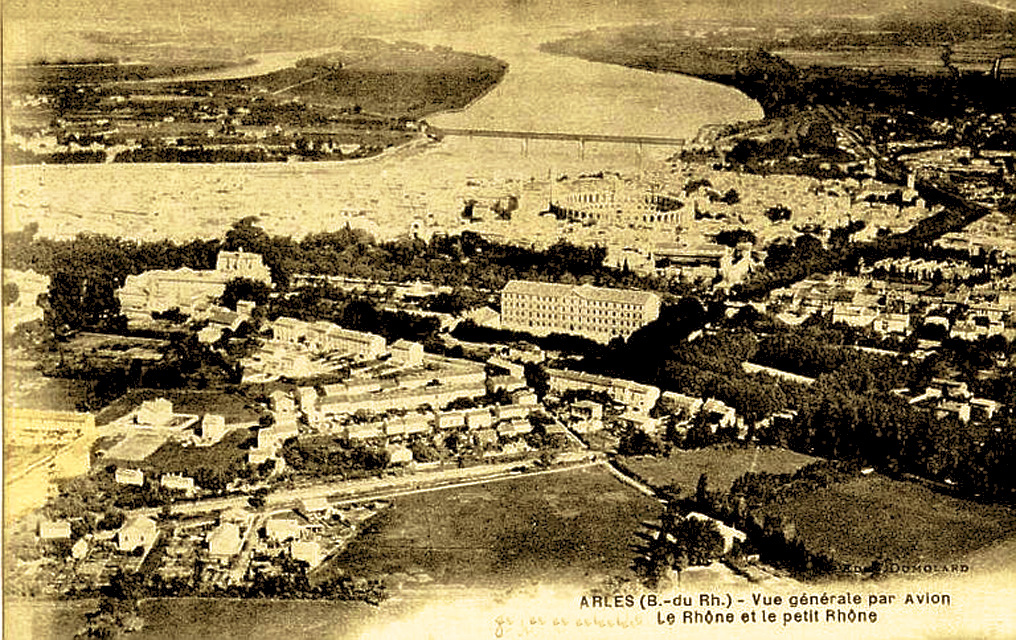 Vue aérienne d'Arles et Trinquetaille